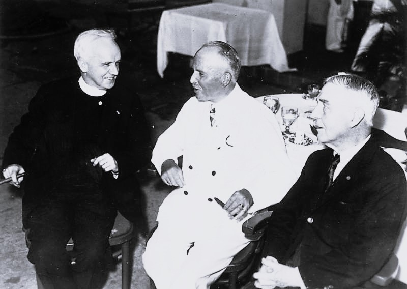 Hawaii, Honolulu, Rote Kreuz - Kongress Rote Kreuz-Führer in Honolulu. Auf der Fahrt zum Internationalen Rote Kreuz-Kongress in Japan traten in Honolulu bekannte Führer des Roten Kreuzes aus aller Welt zusammen. Auch der Führer der deutschen Abordnung, der Präsident des Deutschen Roten Kreuzes, Herzog Karl Eduard von Sachsen-Coburg-Gotha hielt sich auf der Reise nach Tokio dort auf.- U.B.z. den Herzog (in der Mitte) mit dem Leiter des amerikanischen Roten Kreuzes J. B. Payne (rechts) und dem Deligierten der Georgetown-Universität C. Nevills (links) bei einem Zusammensein in Honolulu. Abgebildete Personen: Sachsen-Coburg und Gotha, Karl-Eduard von: 1884-1954, Herzog, Präsident des Deutschen Roten Kreuzes, Deutschland